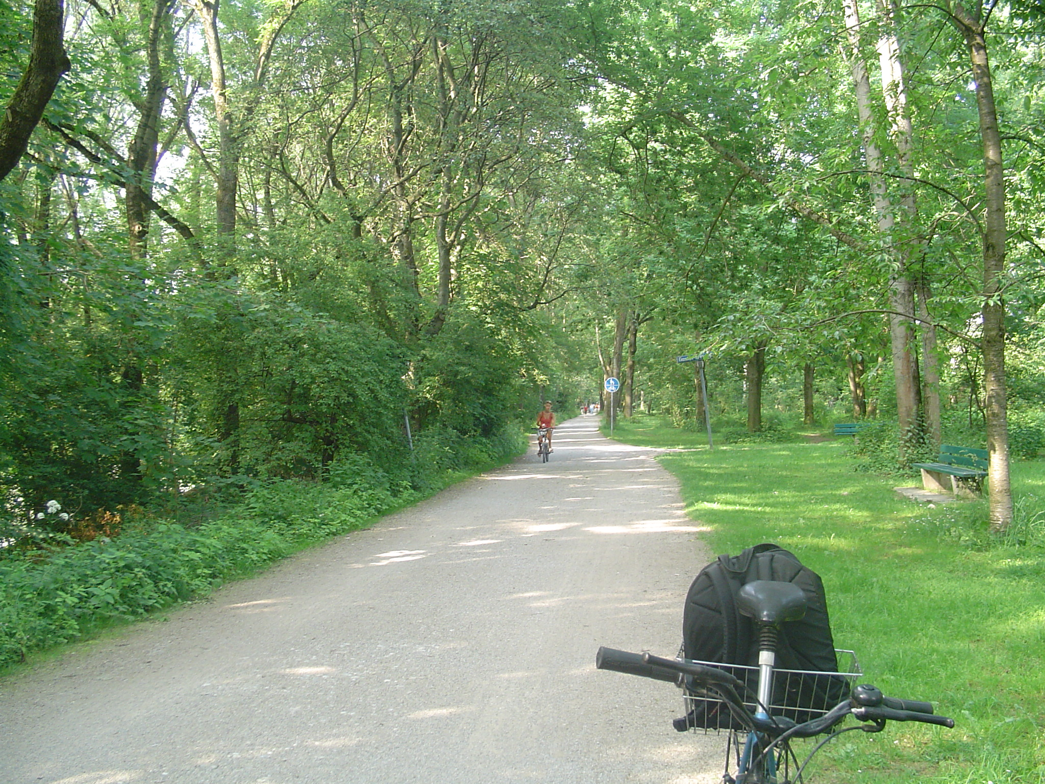 Isar-Radweg in Oberföhring im Münchener Stadtgebiet; der Fluss ist links durch das Gebüsch zu sehen